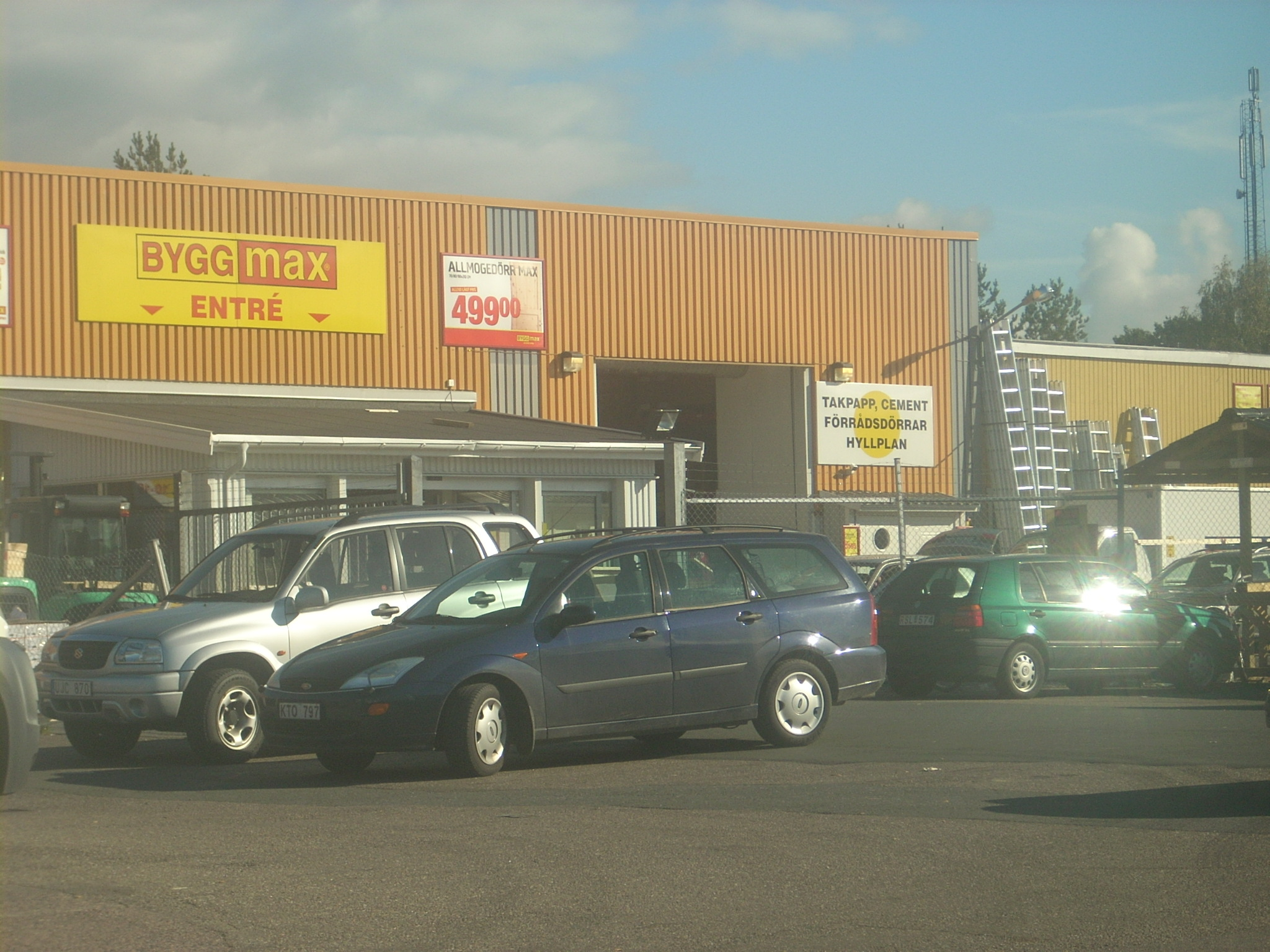 ByggMax i Jönköping